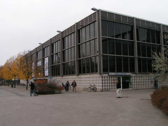 Münchner Eishalle im Olympiapark